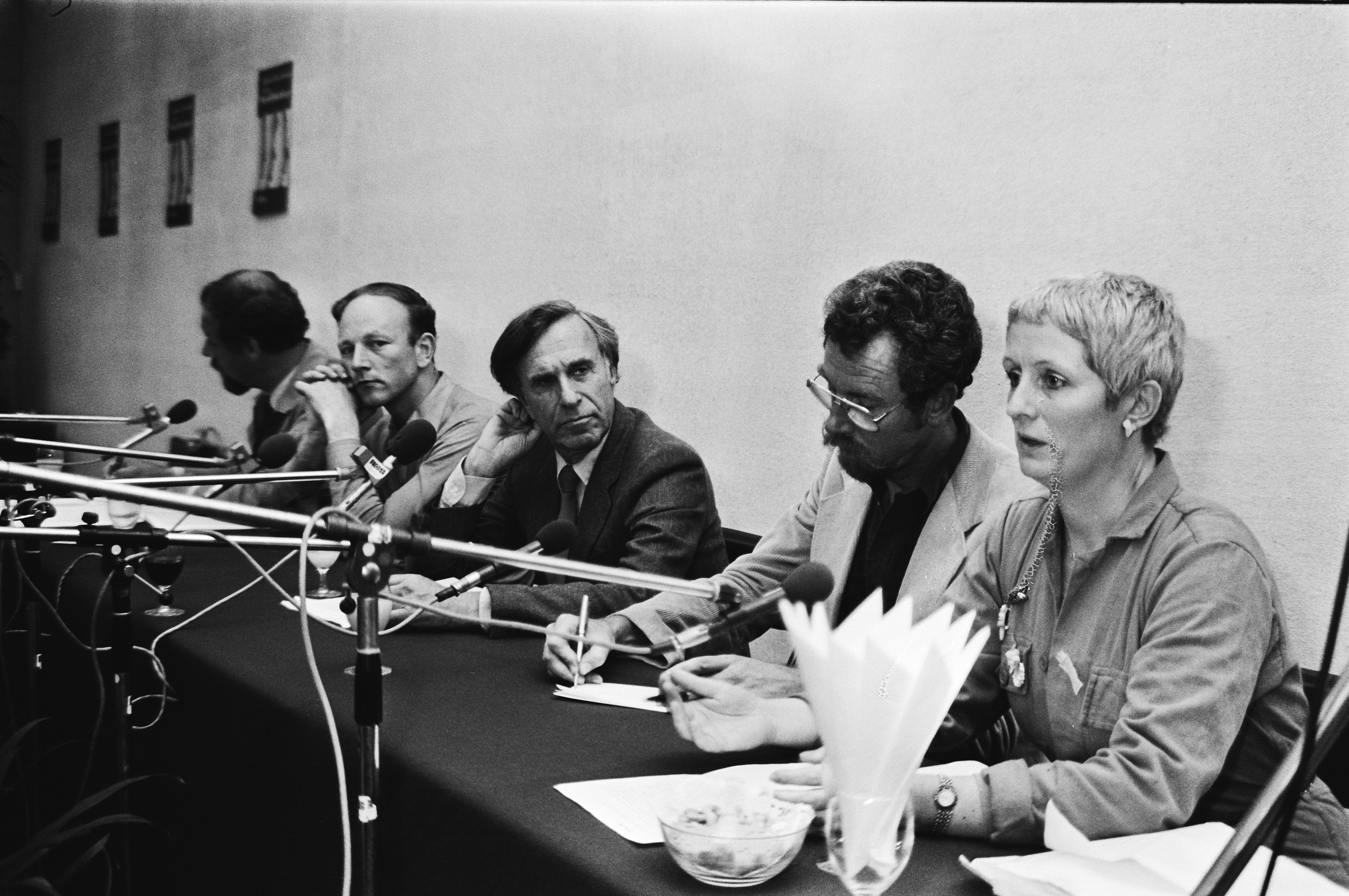 Collectie / Archief : Fotocollectie Anefo Reportage / Serie : [ onbekend ] Beschrijving : Opdracht GPD; forum in Arti et Amicitiae, v.l.n.r. Wam de Moor, Maarten 't Hart, H.A. Gomperts, Koos Hawinkels en Mieke Bal Datum : 25 juni 1980 Trefwoorden : auteurs, forumleden Persoonsnaam : Bal, Mieke, Gomperts, H.A., Hart, Maarten 't, Hawinkels, Koos, Moor, Wam de Fotograaf : Dijk, Hans van / Anefo Auteursrechthebbende : Nationaal Archief Materiaalsoort : Negatief (zwart/wit) Nummer archiefinventaris : bekijk toegang 2.24.01.05 Bestanddeelnummer : 930-8970